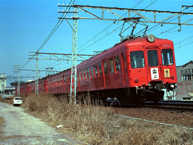 名鉄モ3560形3561。事故にて車体を焼失したモ3500形3504の主要機器を流用し、HL更新車のモ3700形と同一車体を新製した車両。名古屋本線知立 - 牛田間にて撮影。